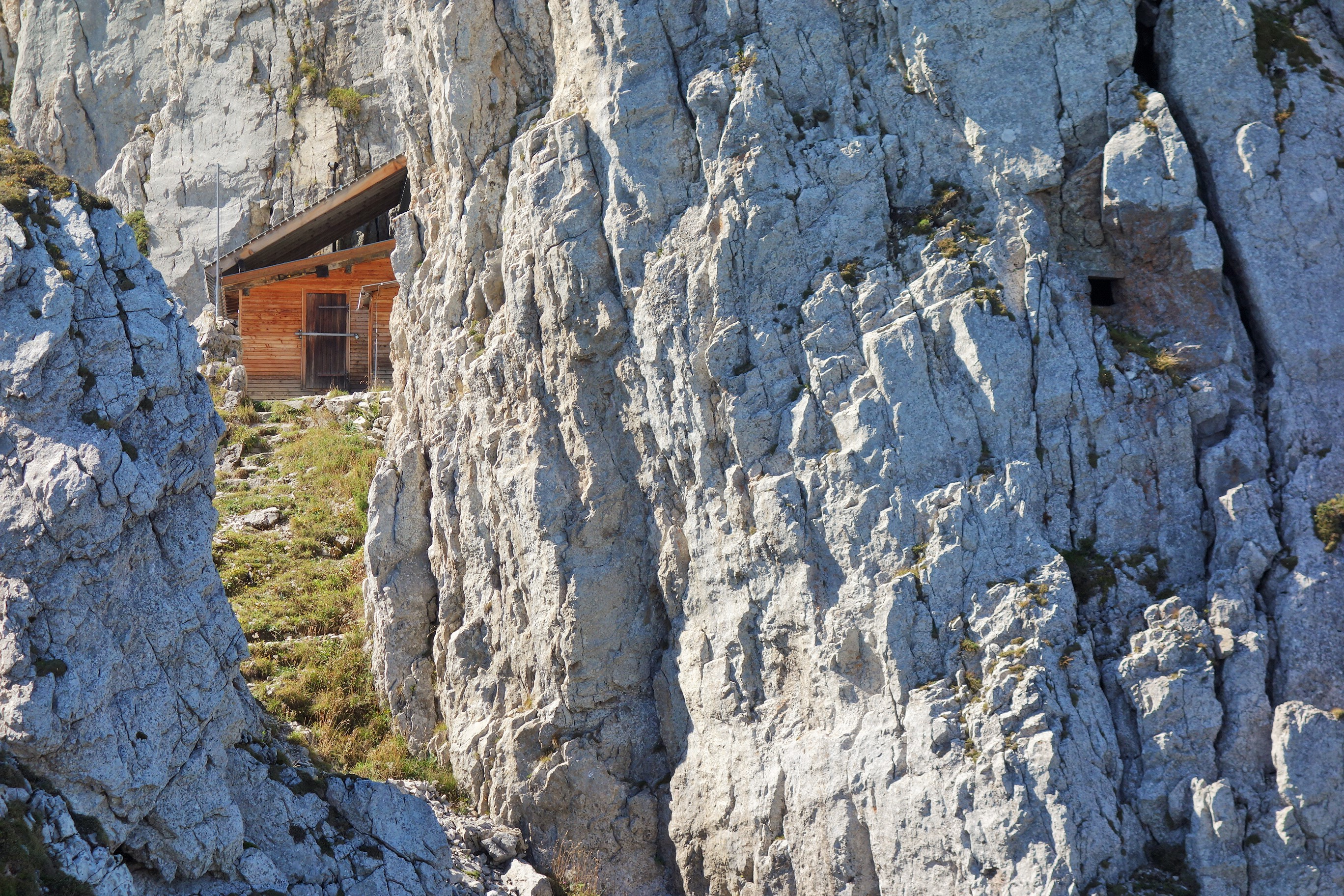 Infanteriewerk Strick A 2363, Sperrstelle Schrattenflluh LU, Schweiz